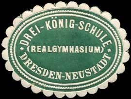 Sealing stamp Title: Realgymnasium - Drei - König - Schule - Dresden - Neustadt Description: grün, weiß, geprägt Place: Dresden size: 3x4 cm